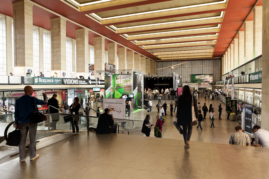 Ausstellungsgelände der Popkomm zur Berlin Music Week 2010 im ehemaligen Flughafen Tempelhof